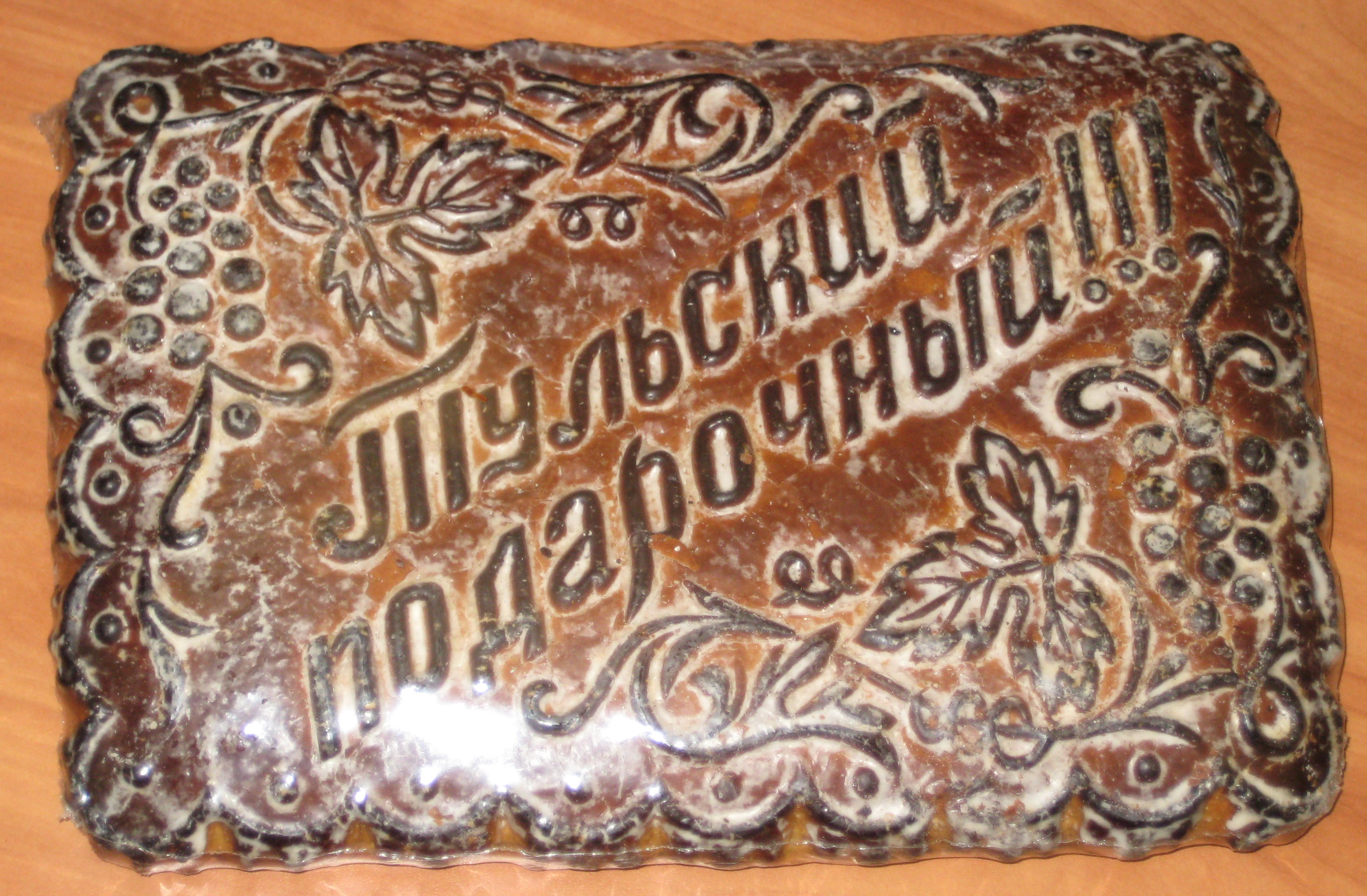 Tula gingerbread (1 kg)